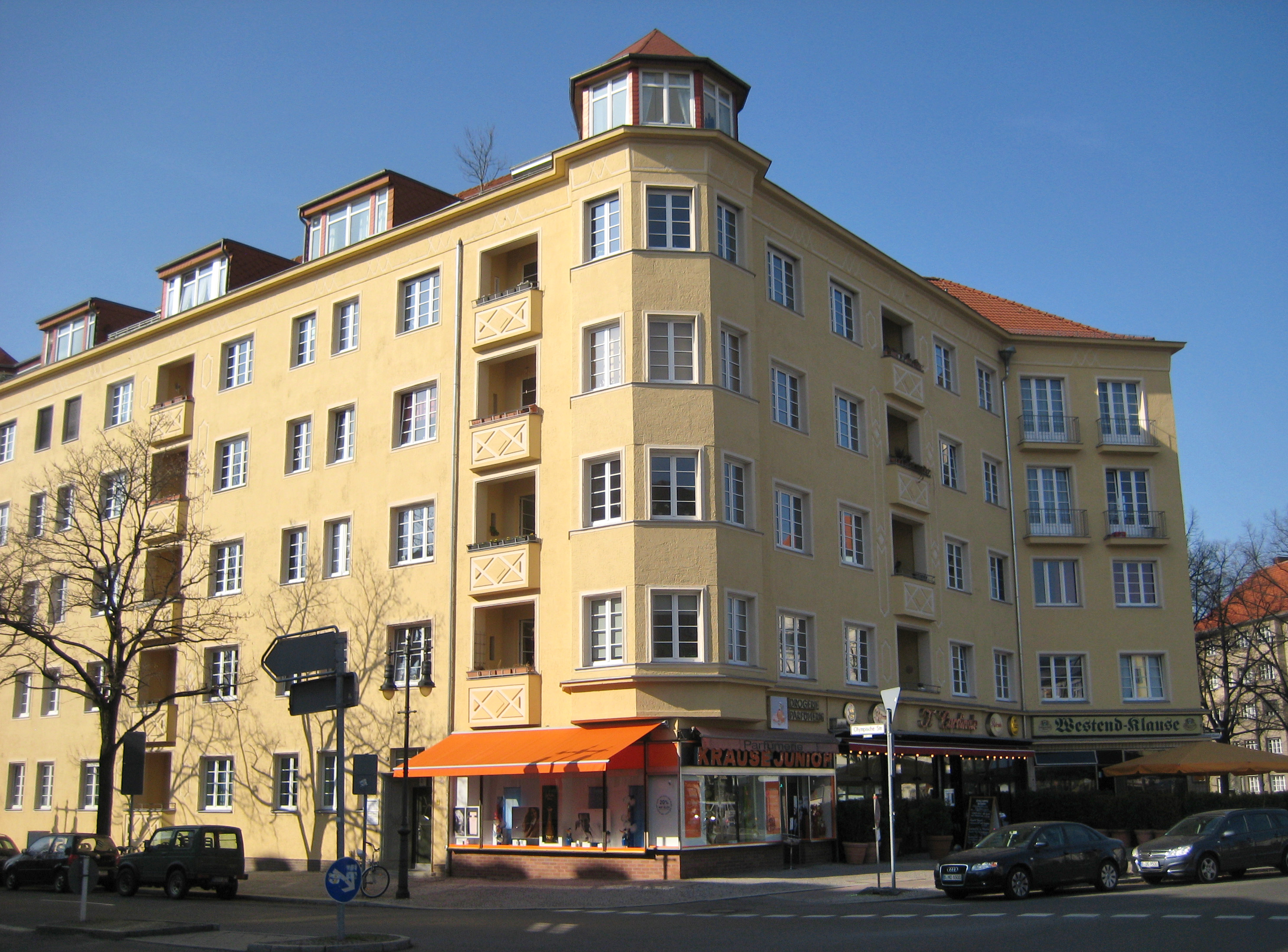 Olympische Straße 2-8, Berlin-Westend